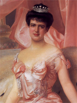 Portrait of Amélie d'Orléans (1865-1951)